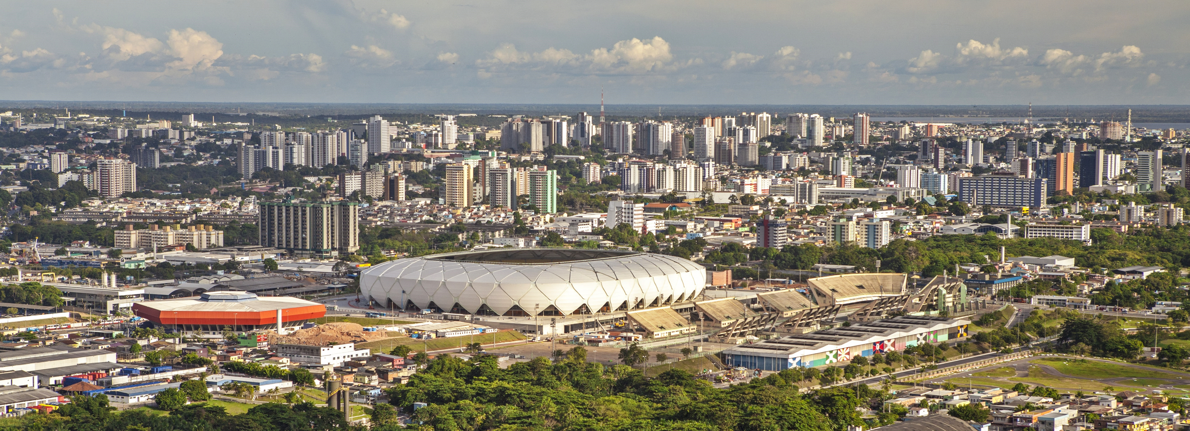 Vista da cidade de Manaus - Amazonas